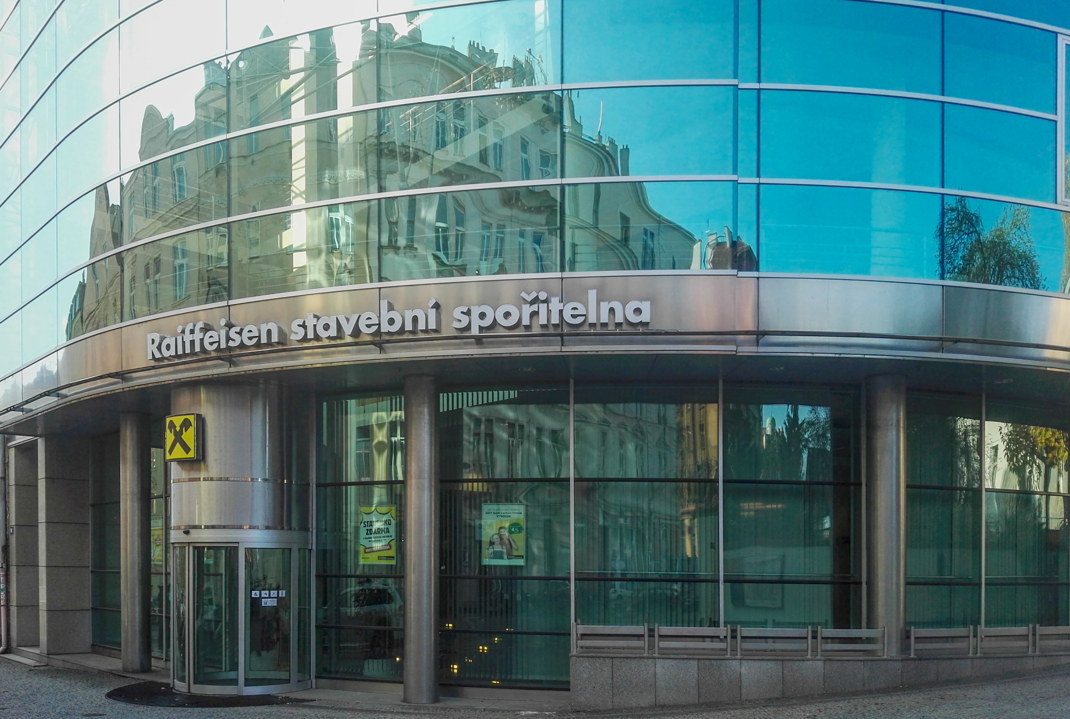 Vchod do sídla společnosti, Praha 3, Koněvova ul.